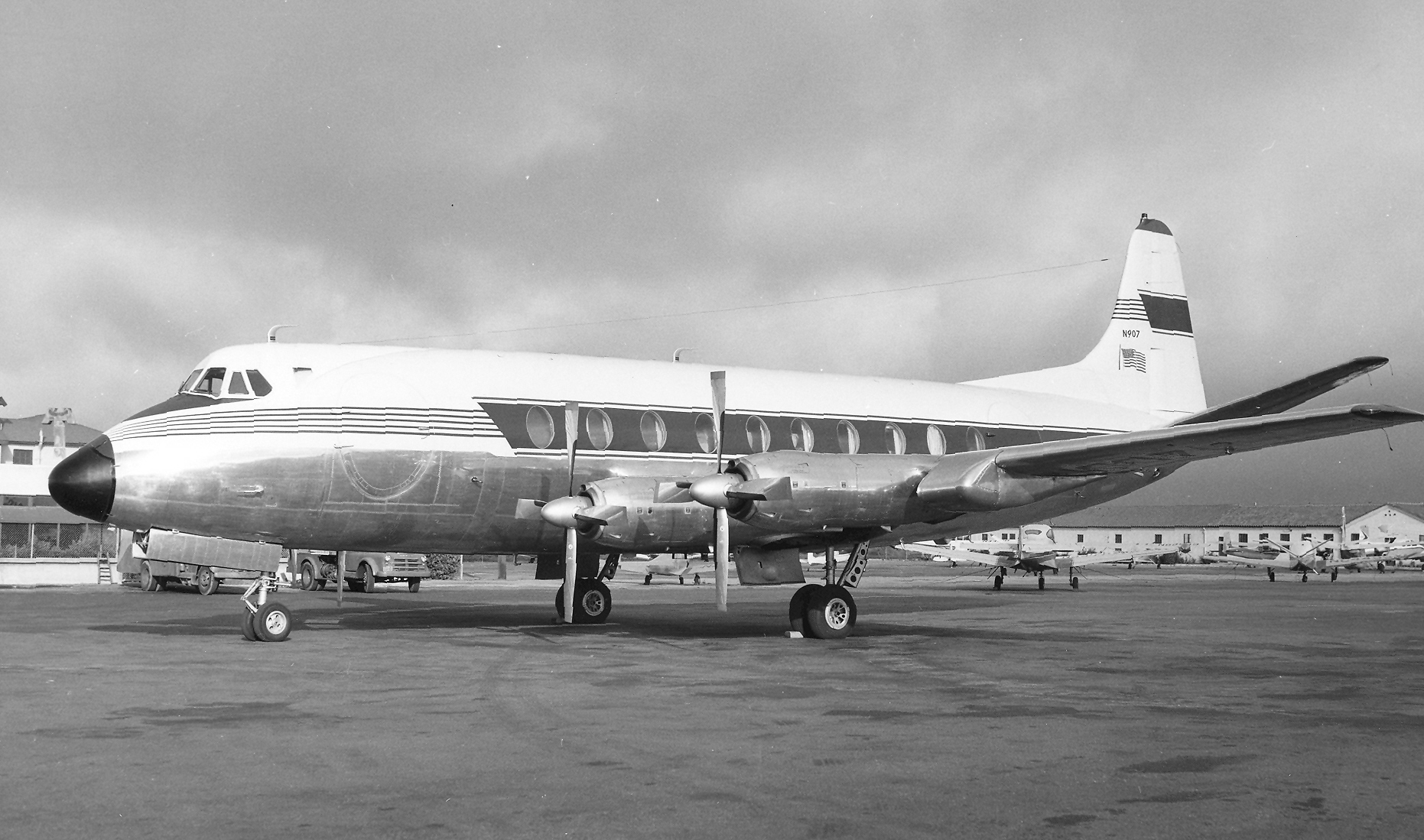 ViscountUSSteel